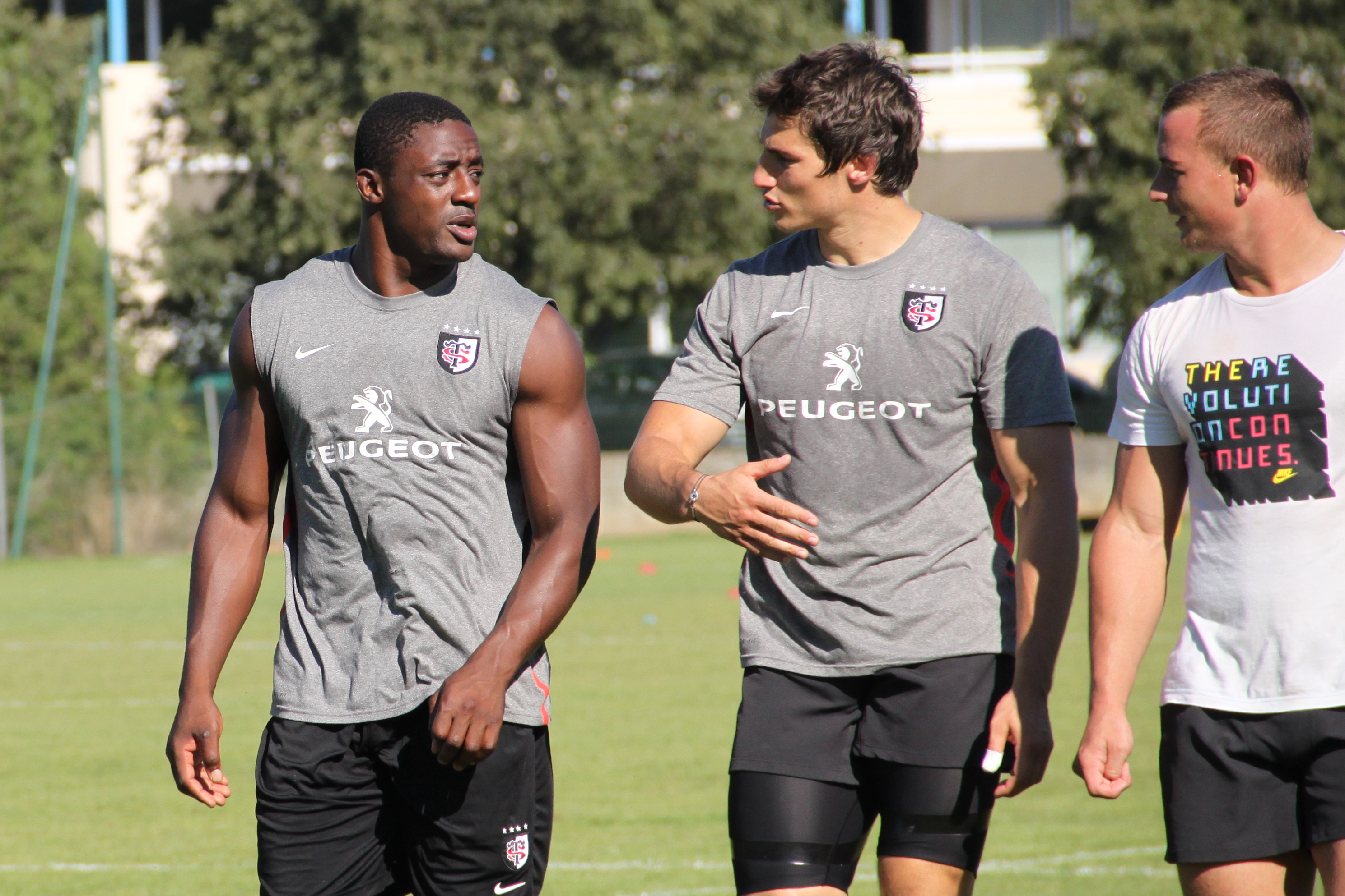 Yannick Nyanga et Sylvain Nicolas à l'entraînement du Stade toulousain du 11 août 2011